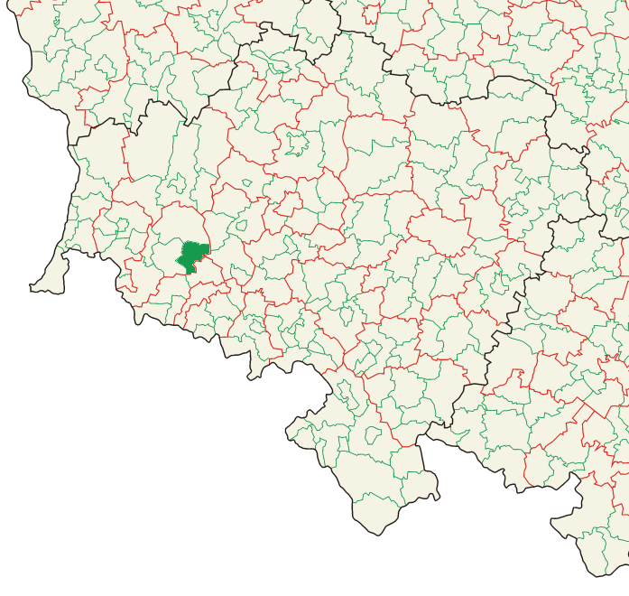 Mapa administracyjna Polski z zaznaczonymi granicami województw (na czarno), powiatów (na czerwono) i gmin (na zielono), południowo zachodni wycinek, województwo dolnośląskie, wycinek z zaznaczeniem gminy Wleń. Stan na 1 stycznia 2008